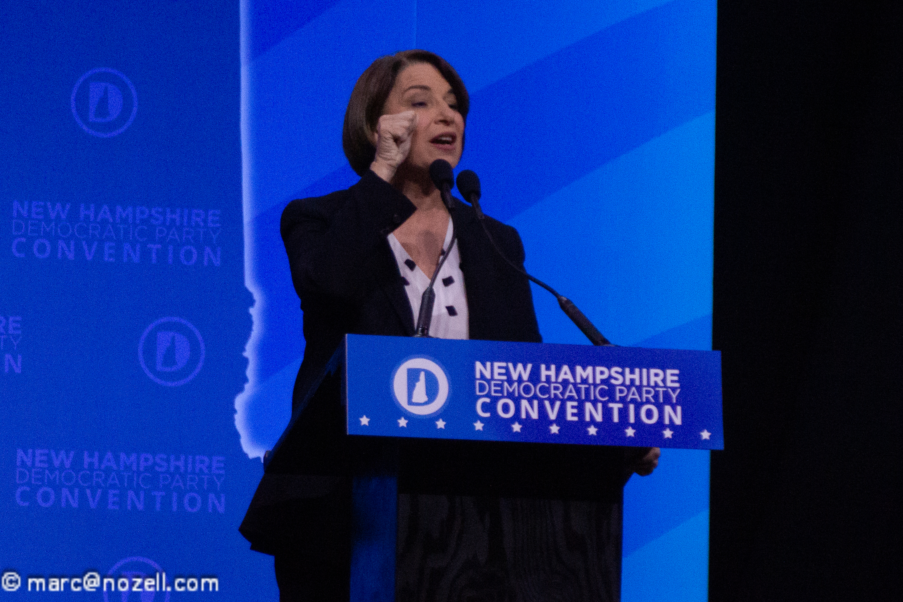 20190907-DSC03495